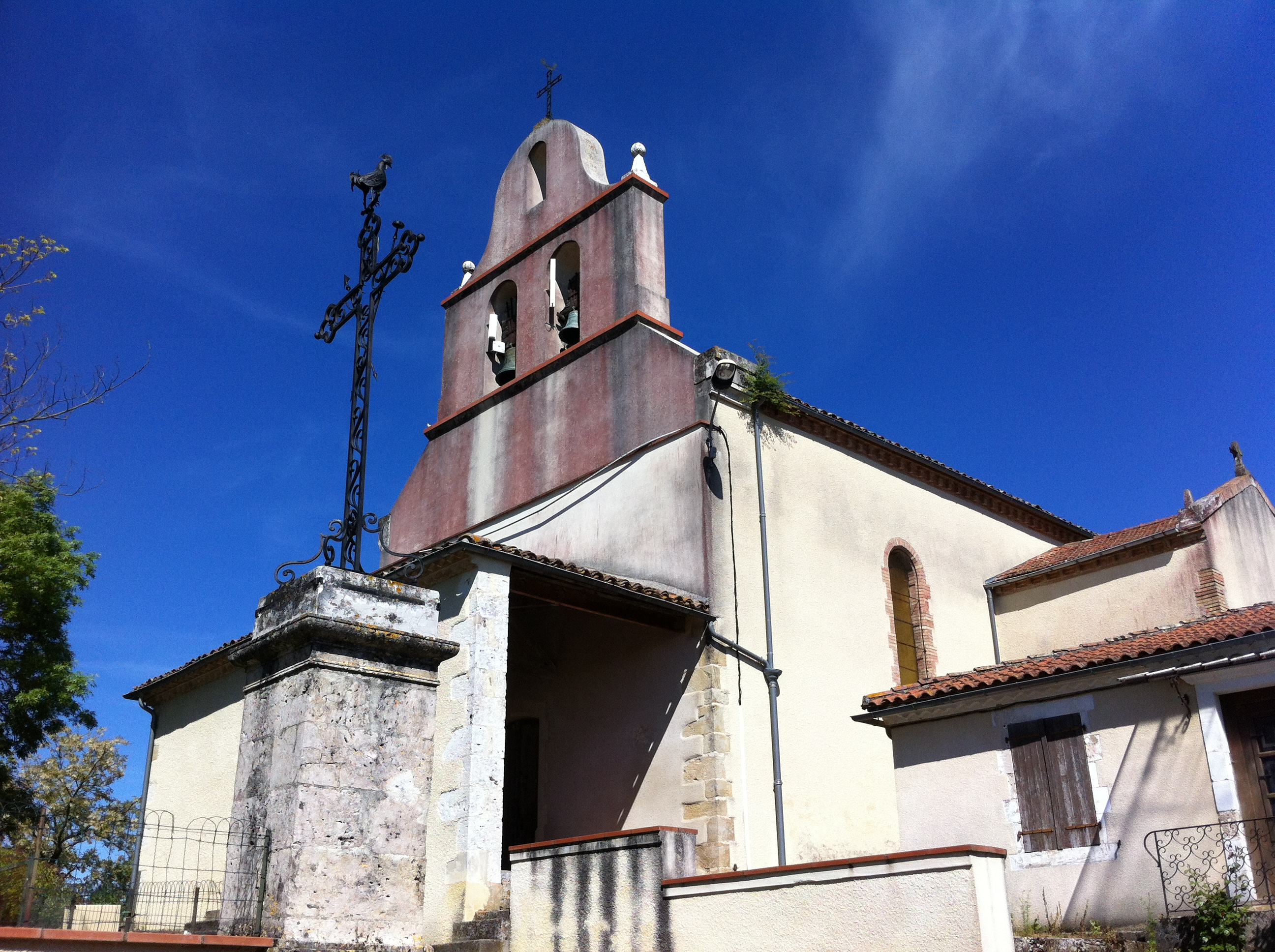 L'église de Crastes, Gers